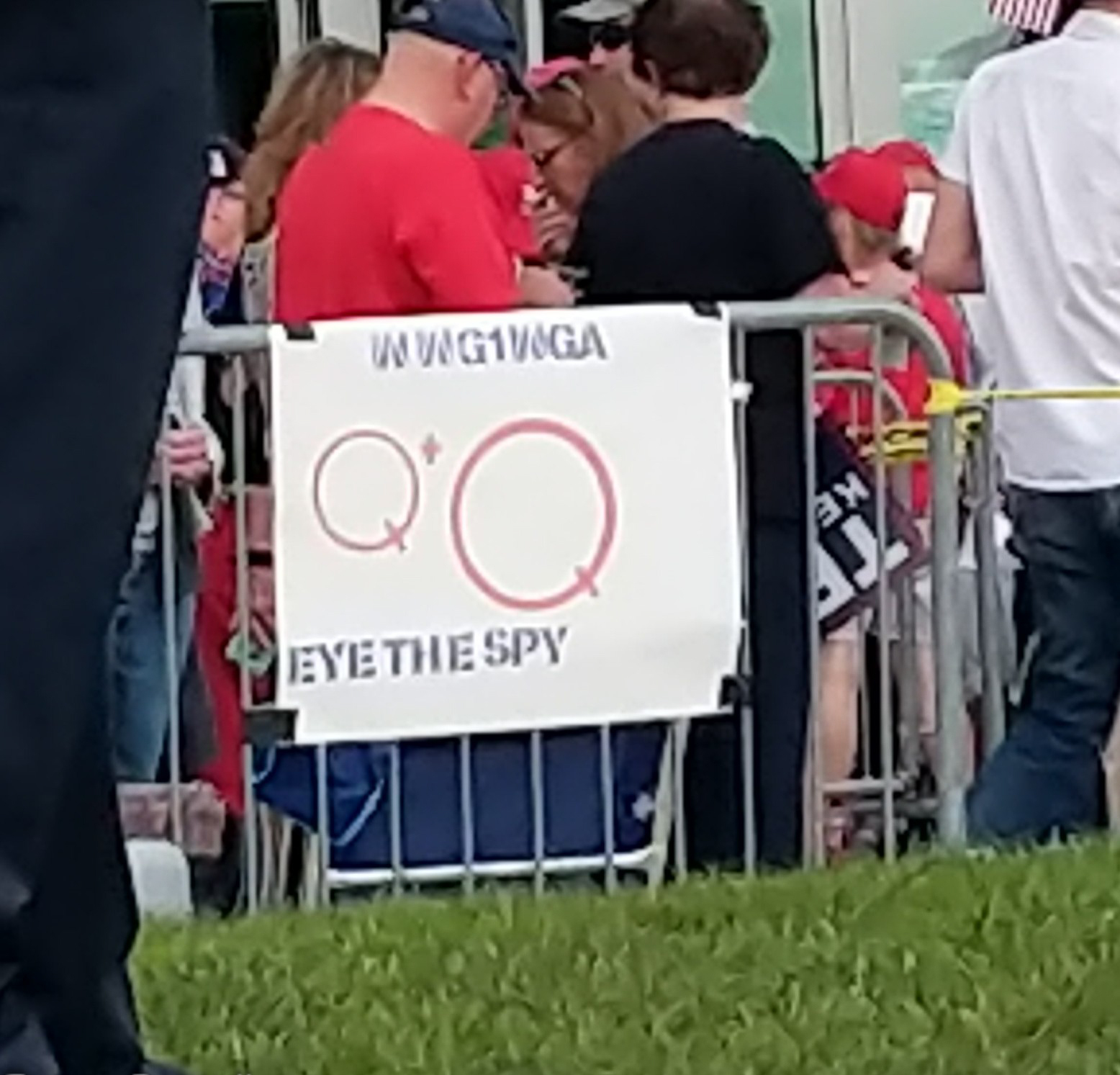 QAnon nutter